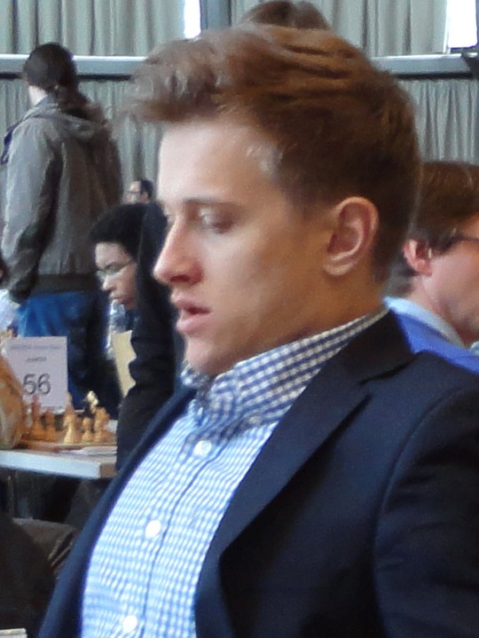 Noel Studer, Grenke Chess Open 2016 in Karlsruhe.